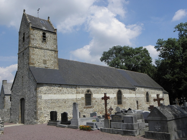 Église paroissiale de Moidrey (50).